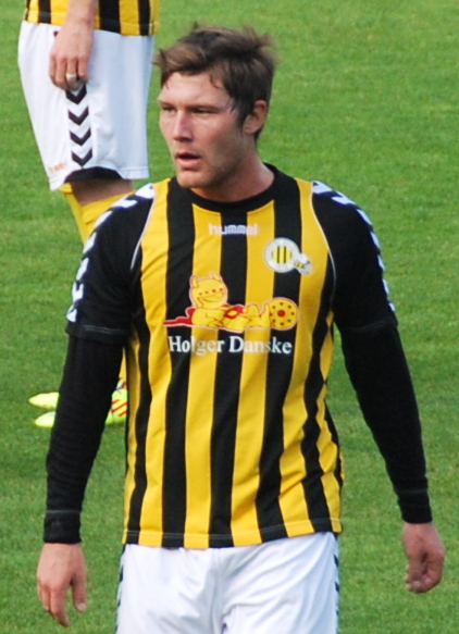 Fodboldspilleren Simon Bræmer fra Brønshøj Boldklub. Her i 1. divisionskampen imellem Viborg FF og Brønshøj Boldklub på Viborg Stadion.